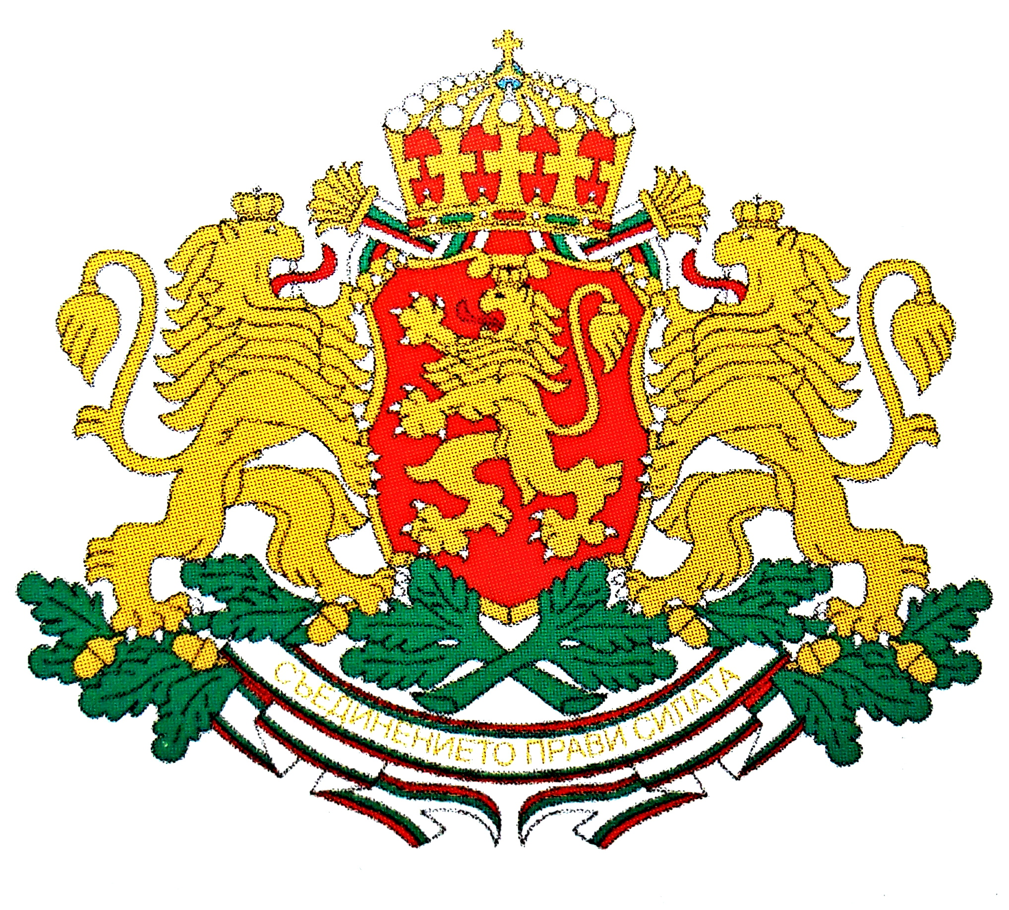 Bulharská pravoslavná církev